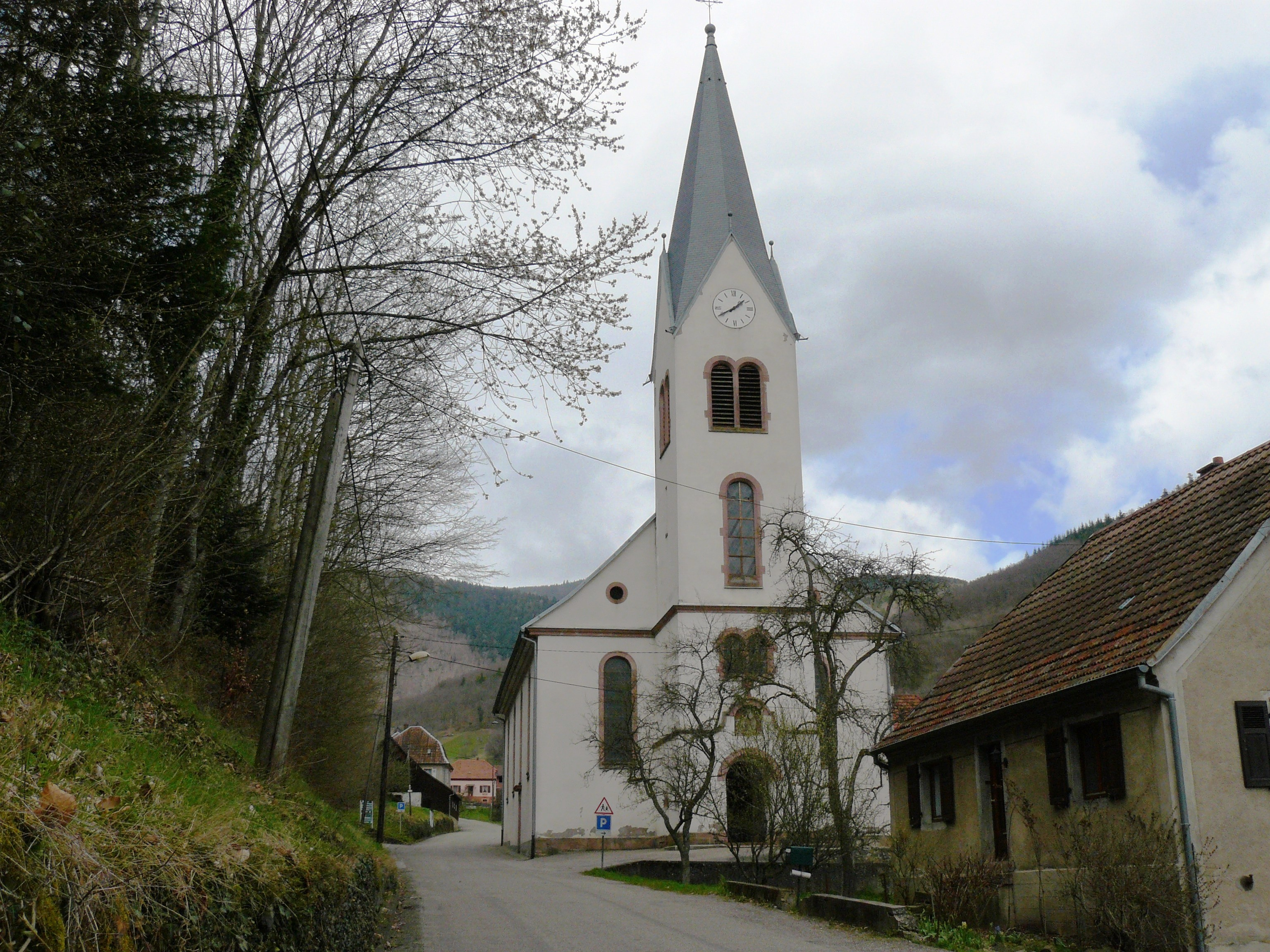 Église Sainte-Marie-Madeleine de la commune de Linthal (Haut-Rhin).